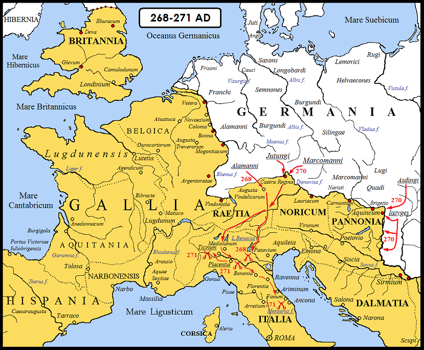 Invasioni barbariche di Alemanni, Marcomanni, Iutungi, Sarmati e Vandali degli anni 267-271